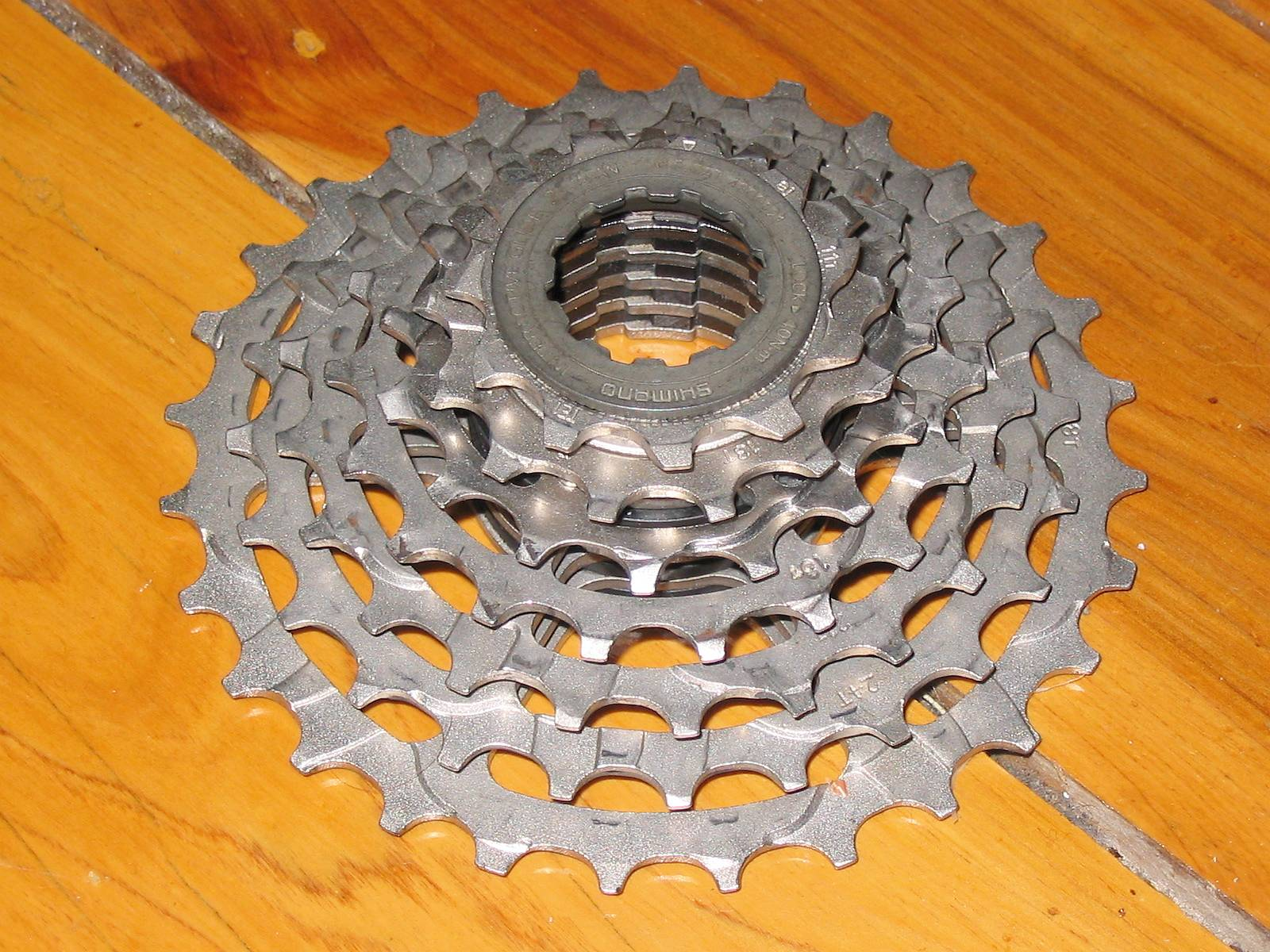 Shimano IG60 cassette